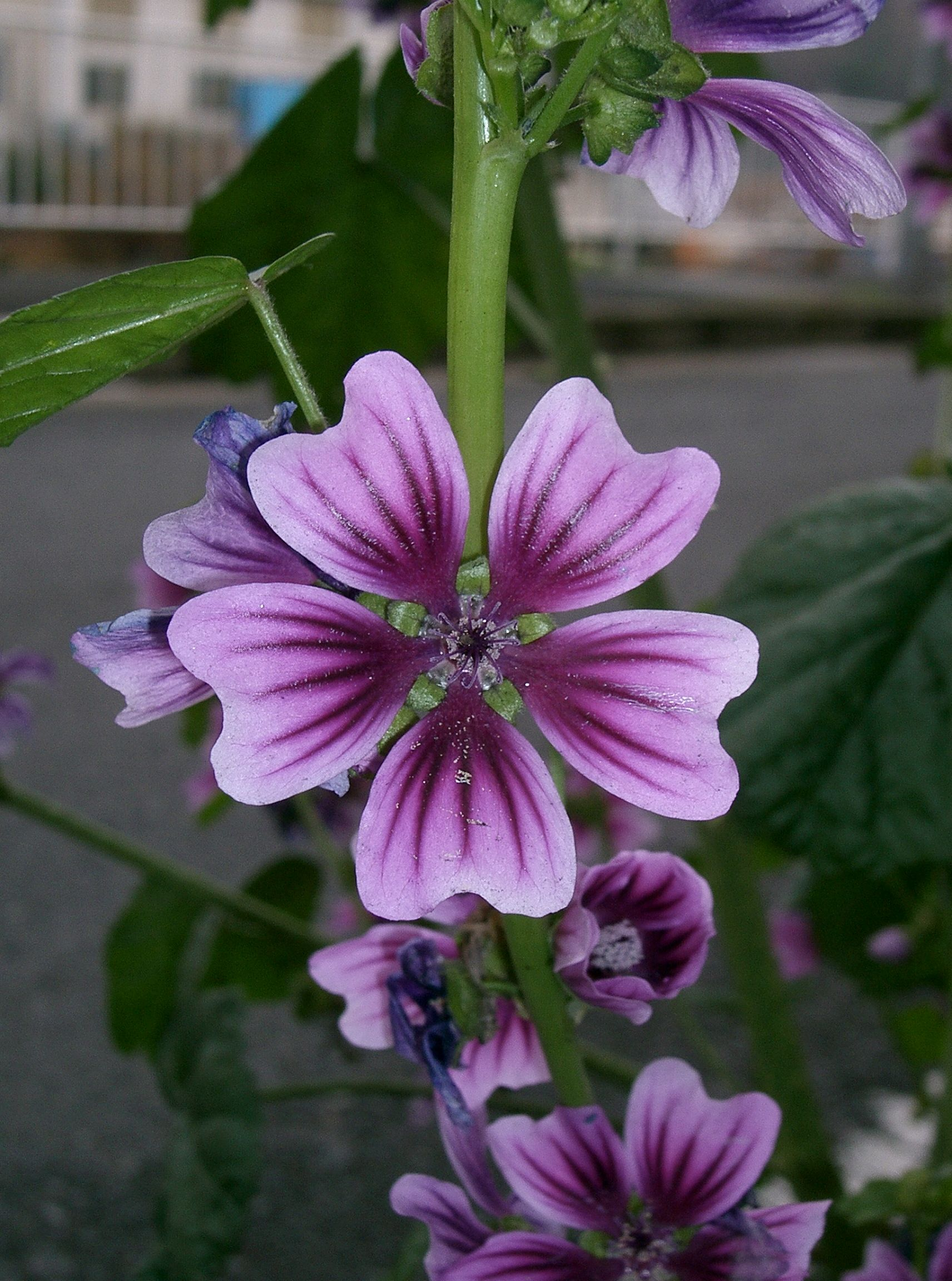 Malva sylvestris var. mauritiana